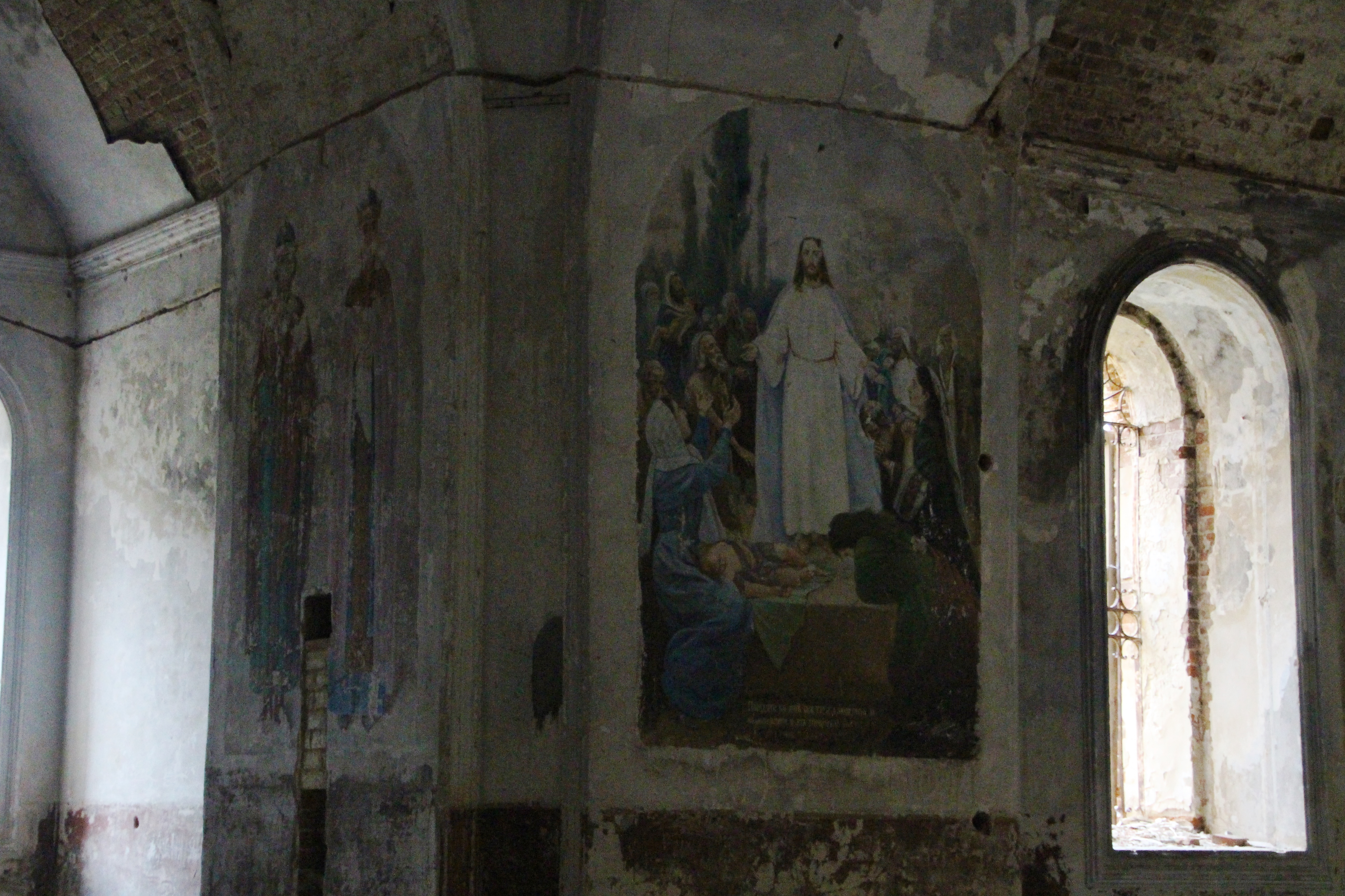 Свято-Димитріївська церква (мур.), село Бишкінь, вул. Перемоги, 48а